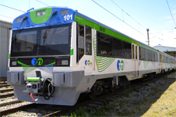 Automotor UT-440R